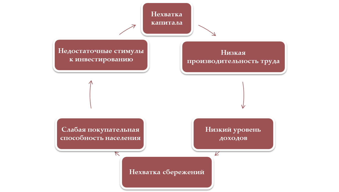 Схема действия "Порочного круга нищеты"